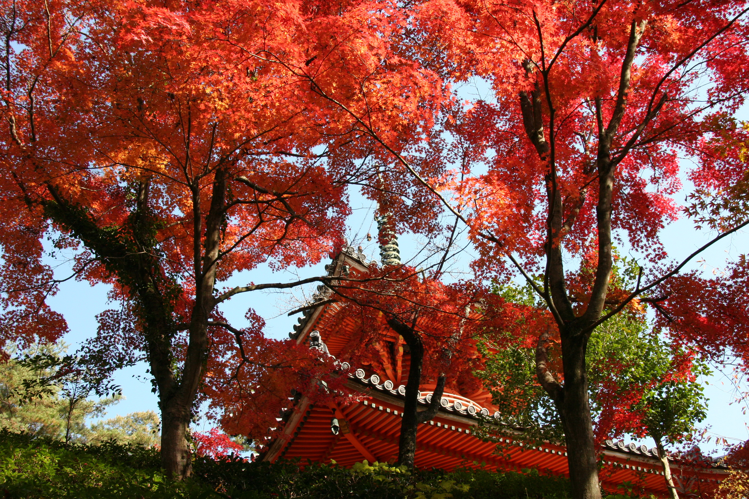 三瀧寺（多宝塔）